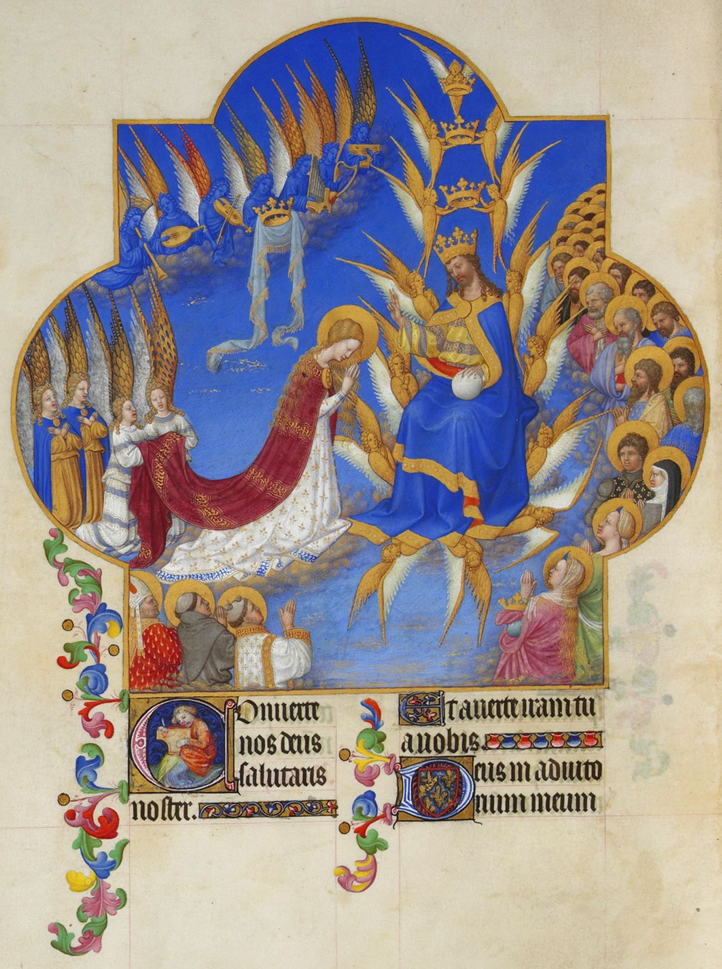 La Vierge bénie par son fils le Christ entourés des anges et des saints